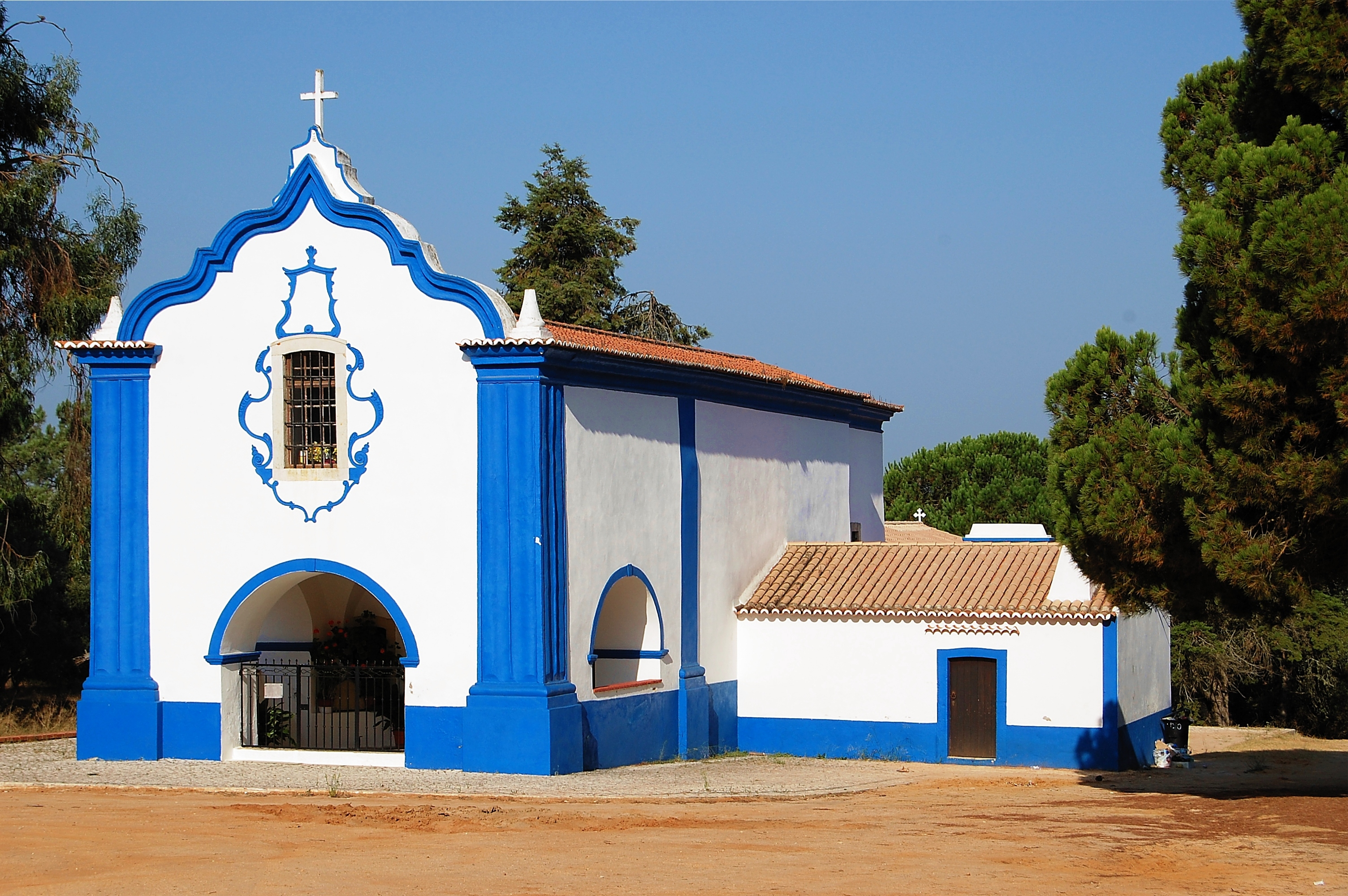 Igreja de Nossa Senhora da Graça, Santo André, Santiago do Cacém, Alentejo, Portugal.